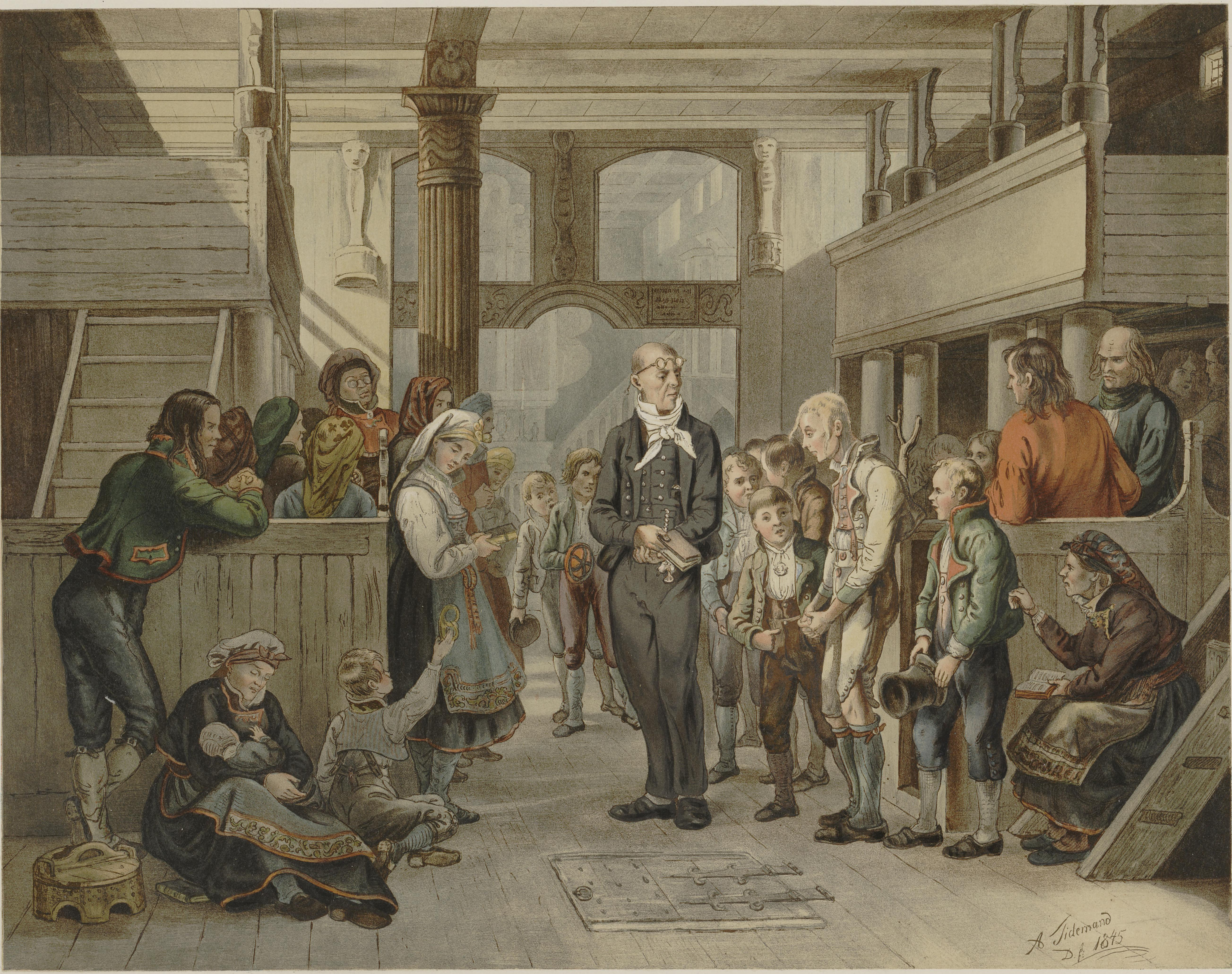 Illustrasjon hentet fra boken Norske Folkelivsbilleder av Tidemand, Adolph og utgitt av Chr. Tønsberg (Christiania, 1854)